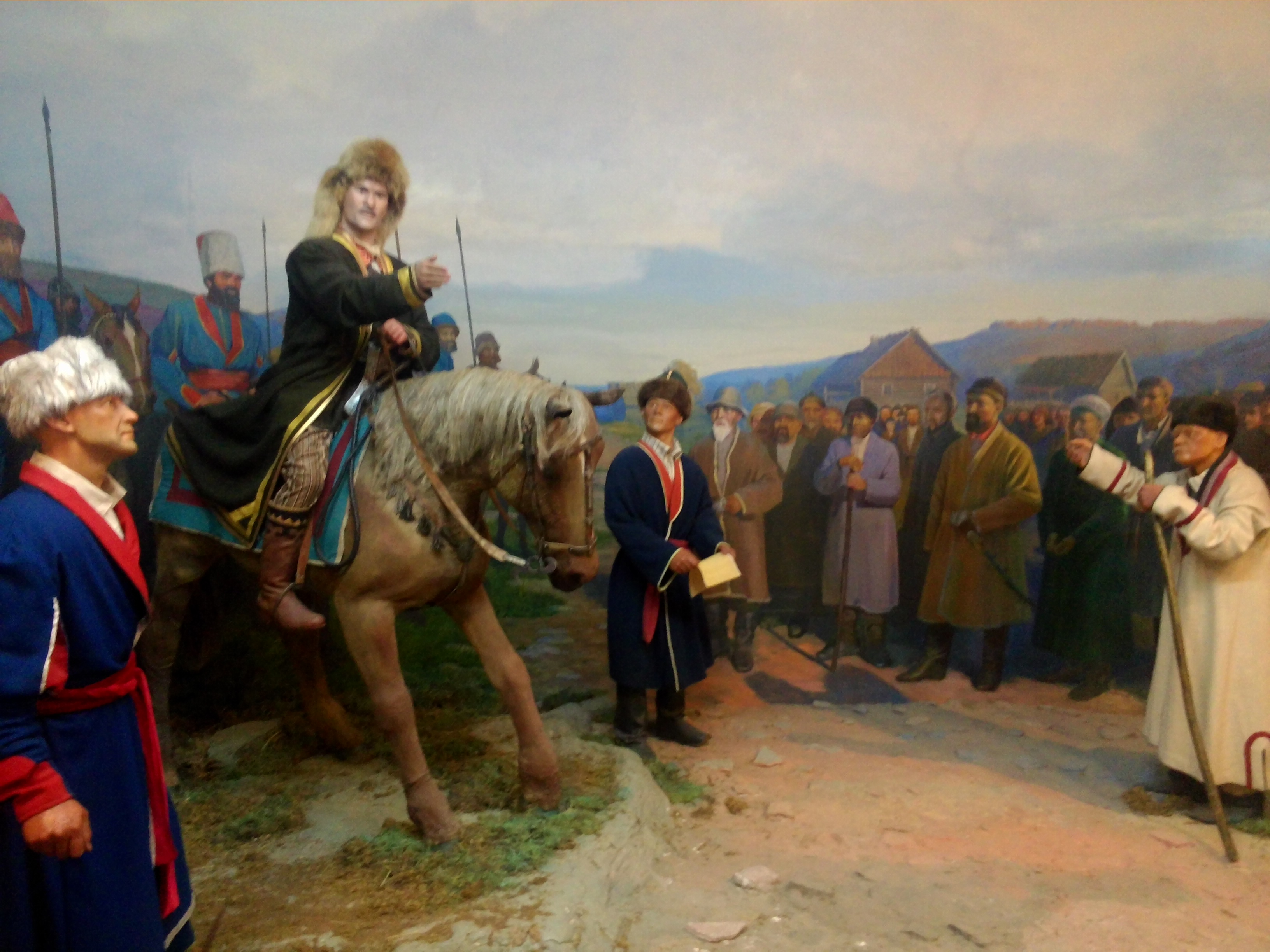 Національний музей Республіки Башкортостан